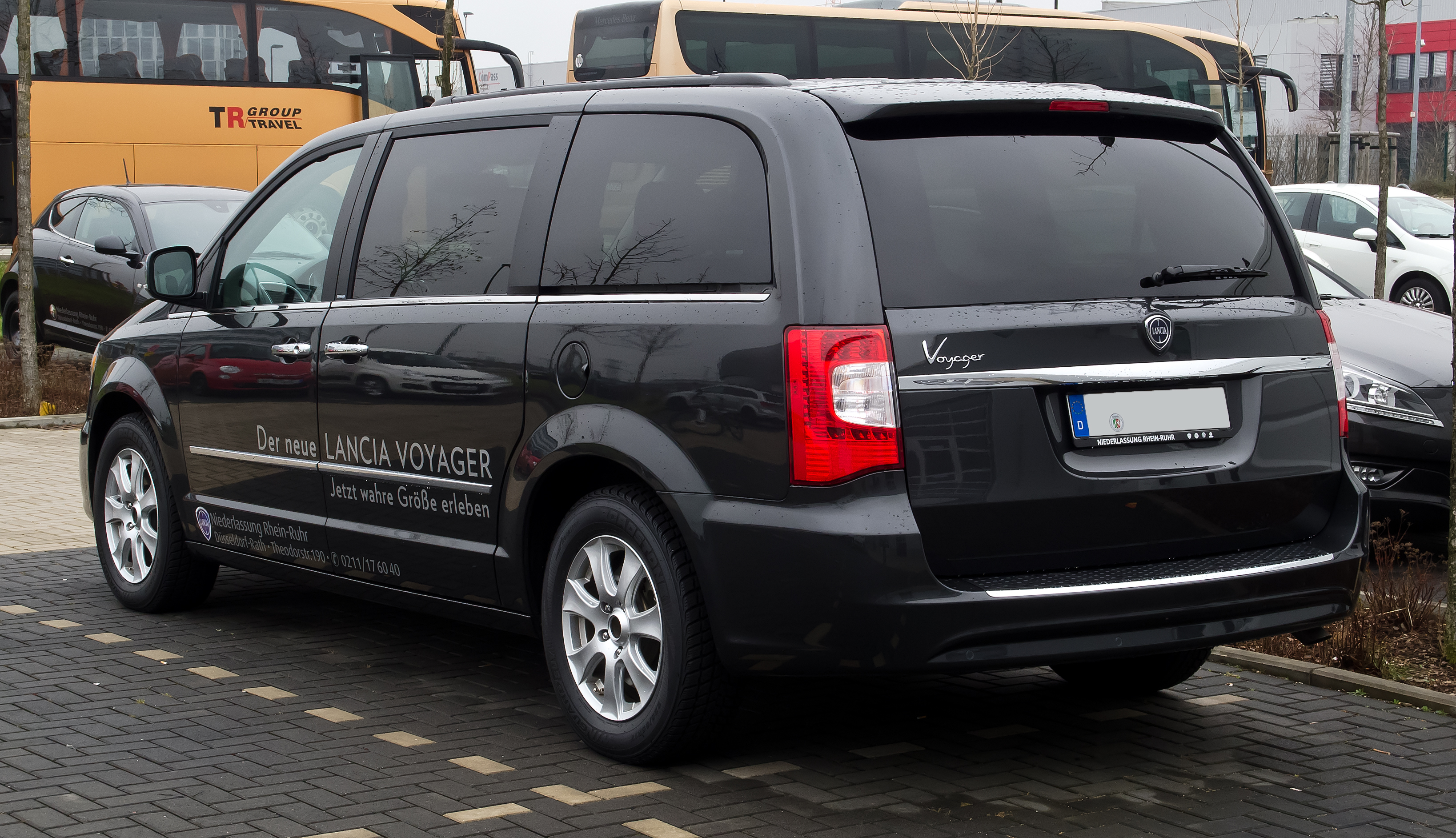 Lancia Voyager 2.8 MultiJet 16v Gold